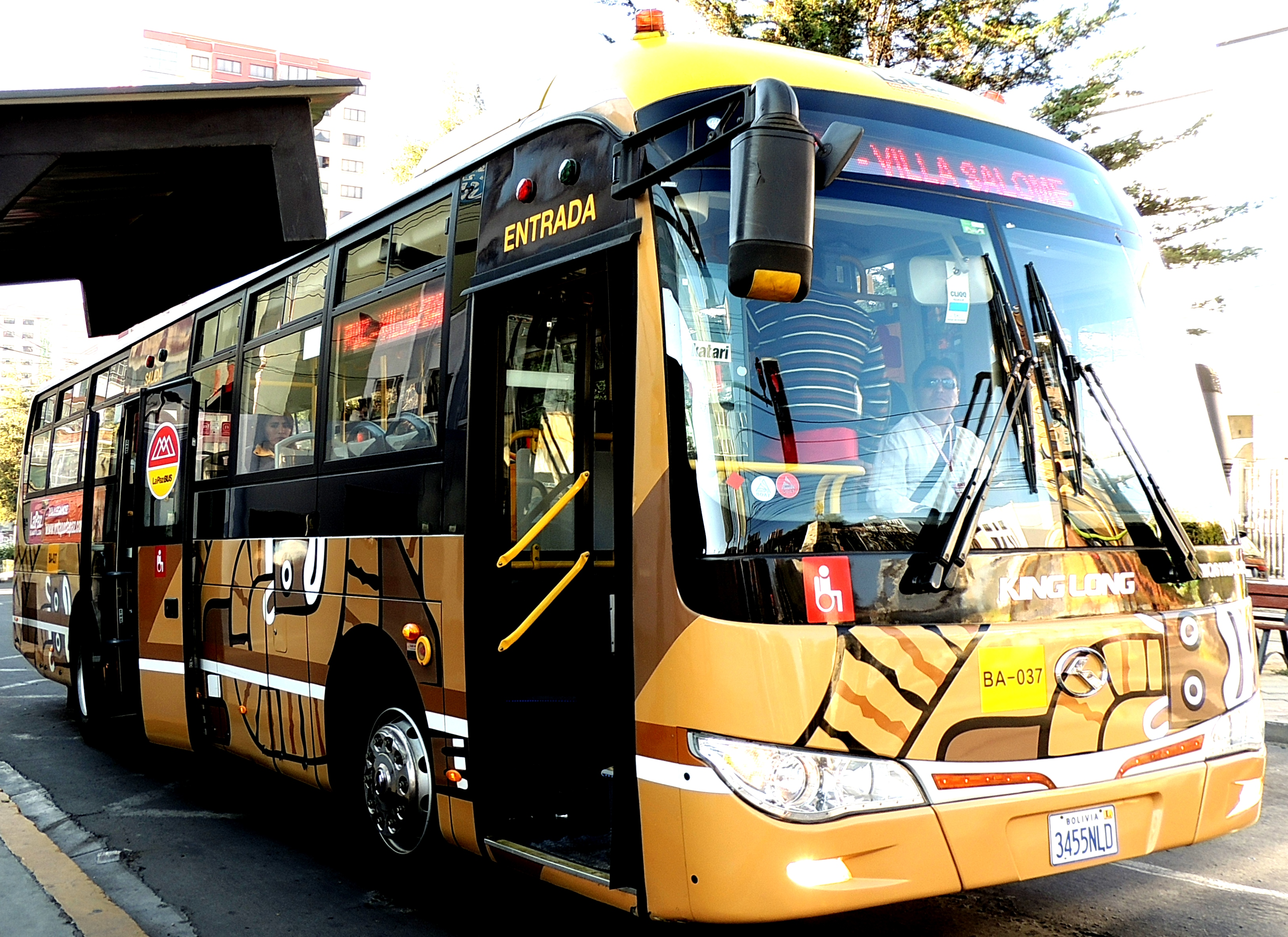 Bus Pumakatari del Sistema La Paz Bus, Bolivia